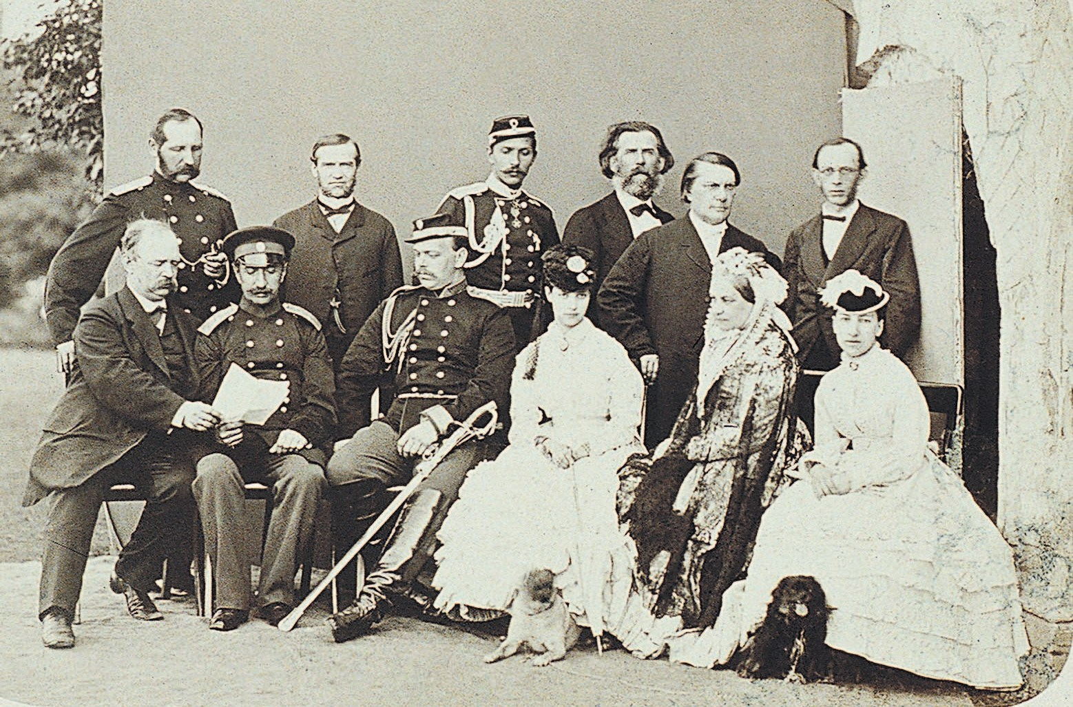 Цесаревич Александр Александрович и цесаревна Мария Фёдоровна со свитой. Слева направо - в первом ряду: Н. А. Качалов, В. В. Зиновьев, цесаревич Александр с женой, Ю. Ф. Куракина, А. А. Куракина. Во втором ряду: Г. И. Гирш, Ф. А. Оом, П. А. Козлов, А. П. Боголюбов, И. К. Бабст, К. П. Победоносцев.